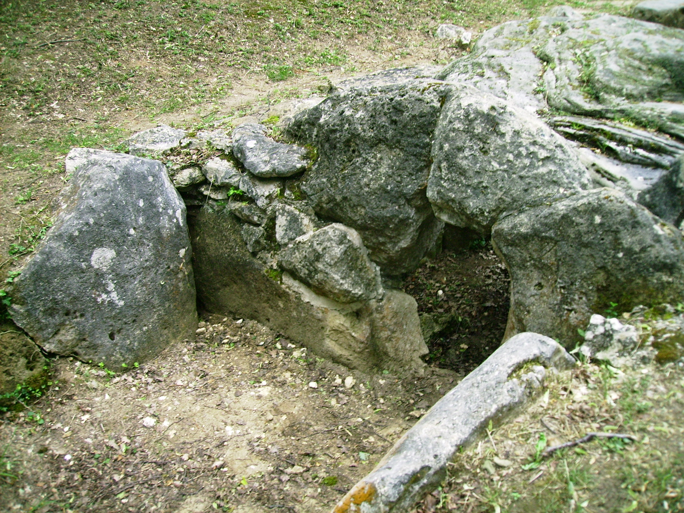 L'antichambre de l'allée couverte de la Pierre Plate à Presles (95).